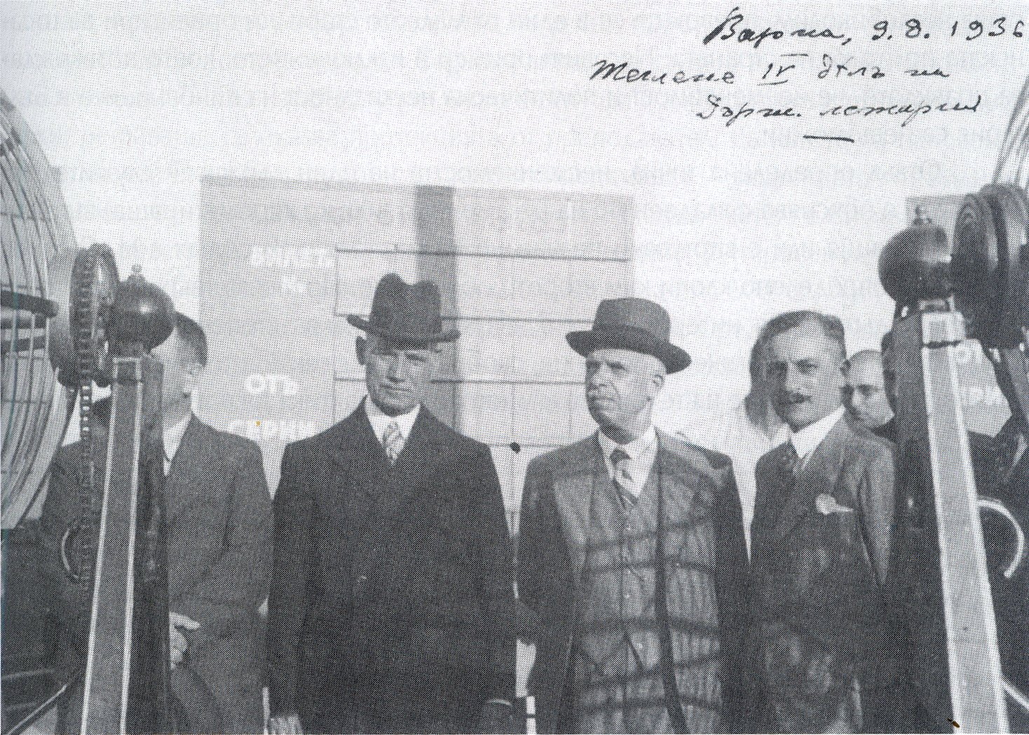 Теглене на тиража на Държавната лотария